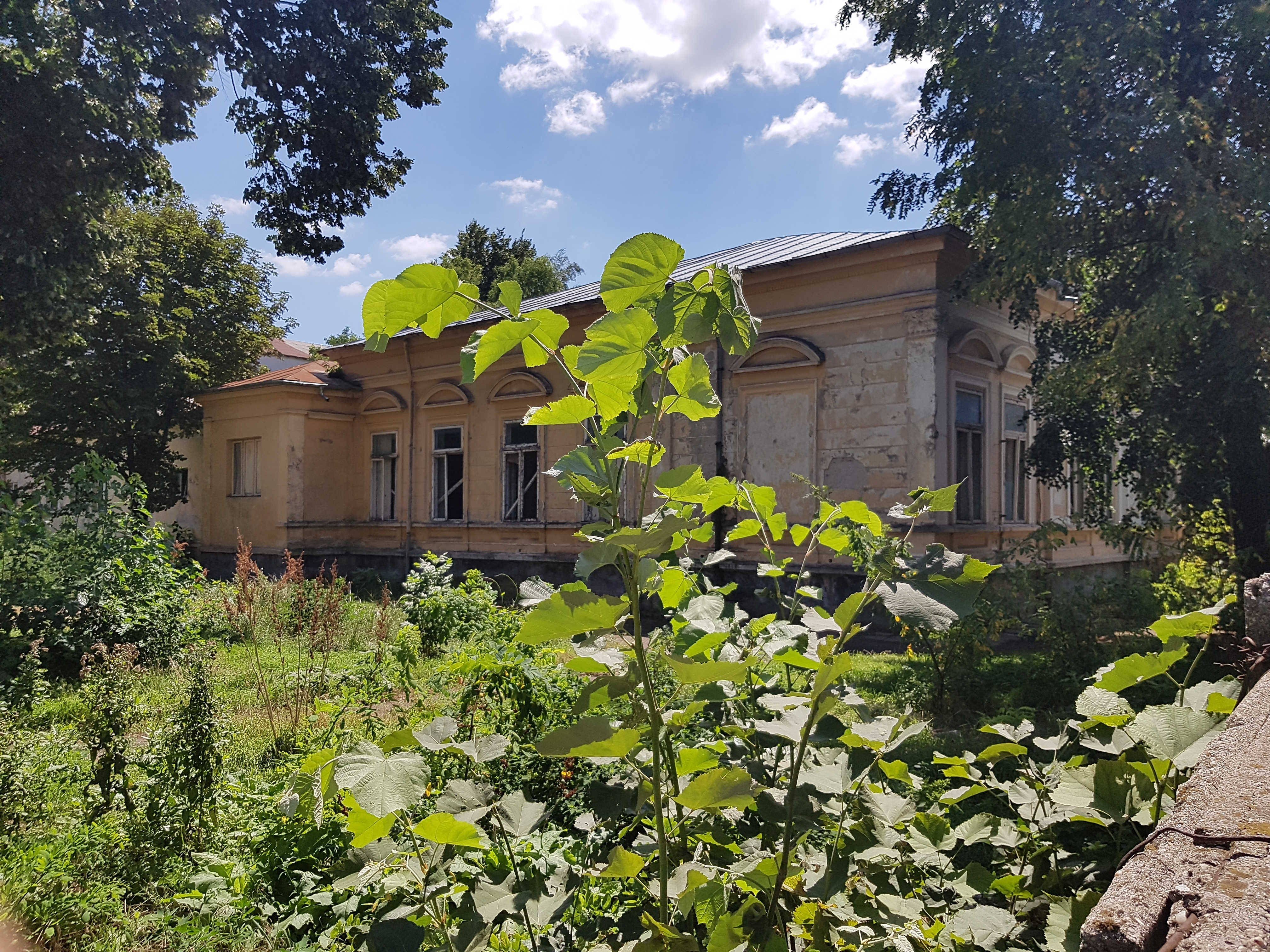 Casa Macridescu